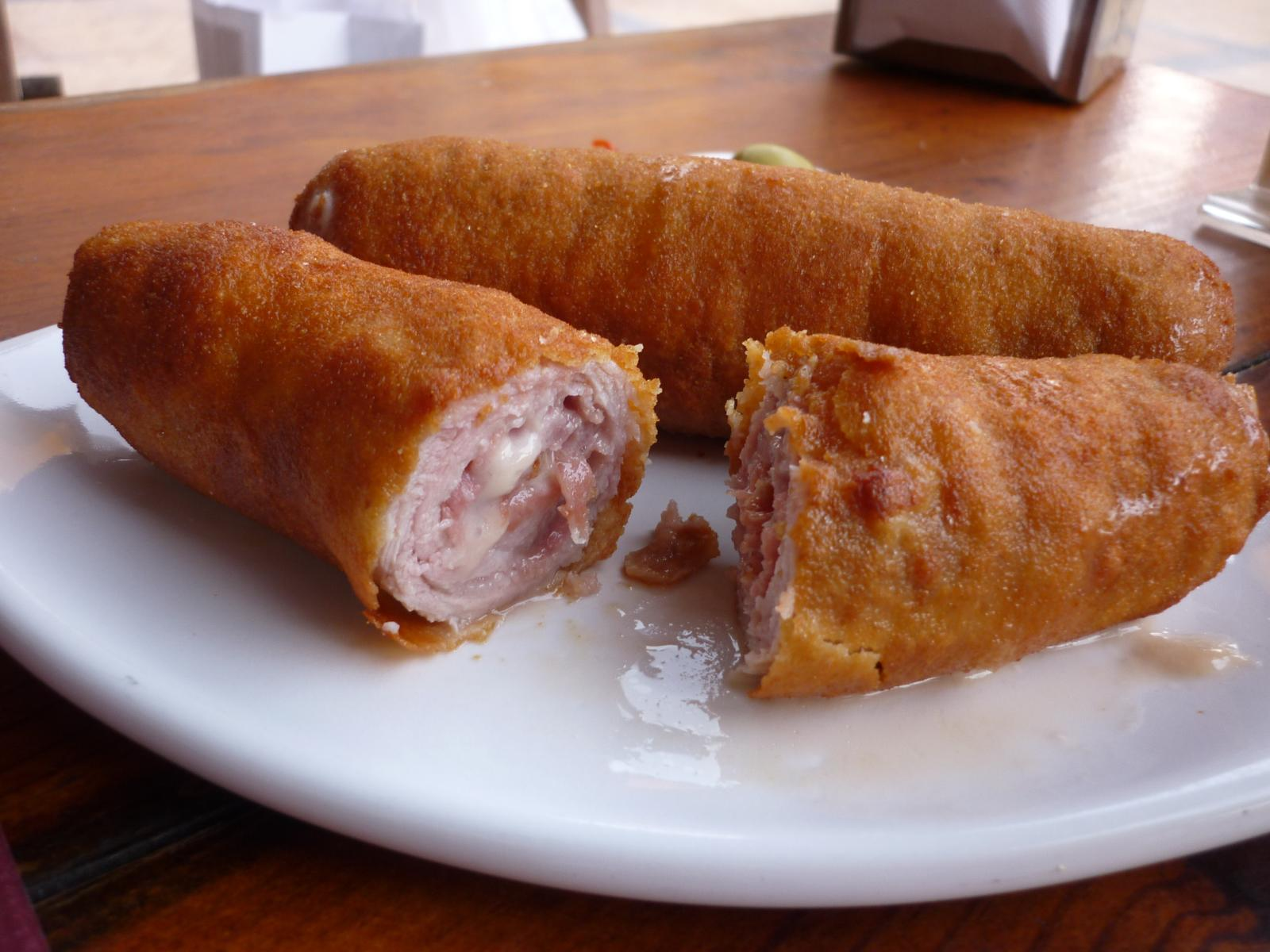 Un flamenquín servido en Oviedo. Se trata de un plato típico de Córdoba (España), un rollo rebozado y frito, de jamón, queso y lomo de cerdo.